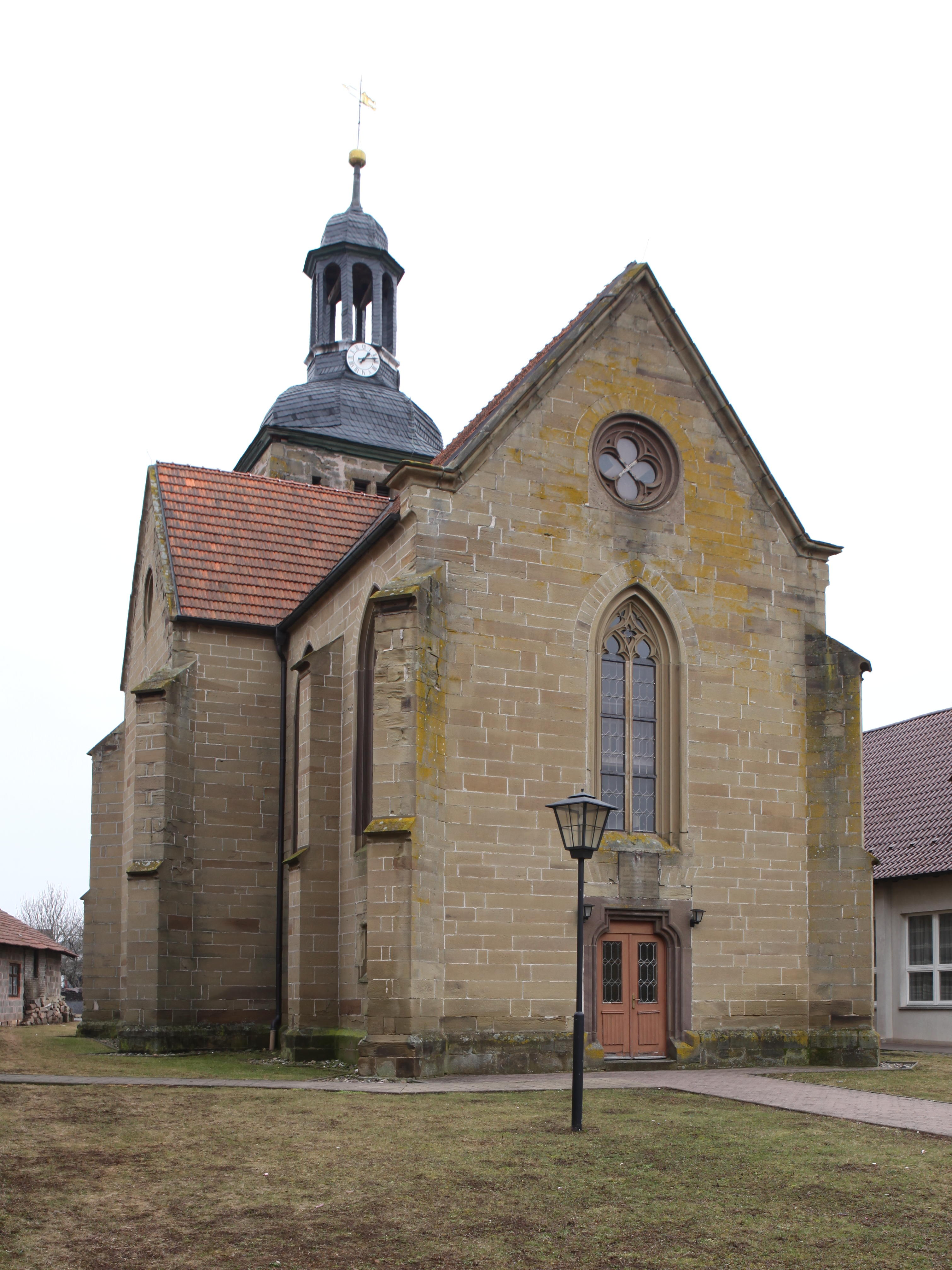 Ev. Kirche St. Nikolaus Gleicherwiesen, OT von Gleichamberg, Landkreis Hildburghausen